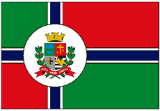 Bandeira de Monteiro Lobato